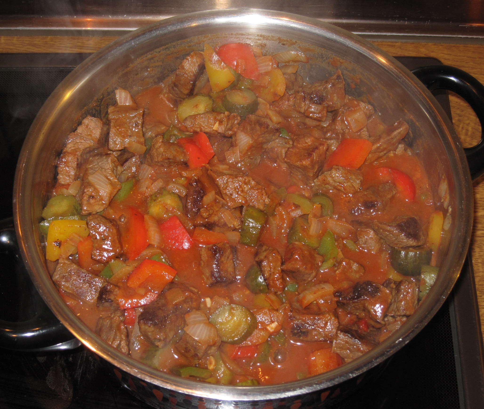 Schmoren von Rindergulasch.